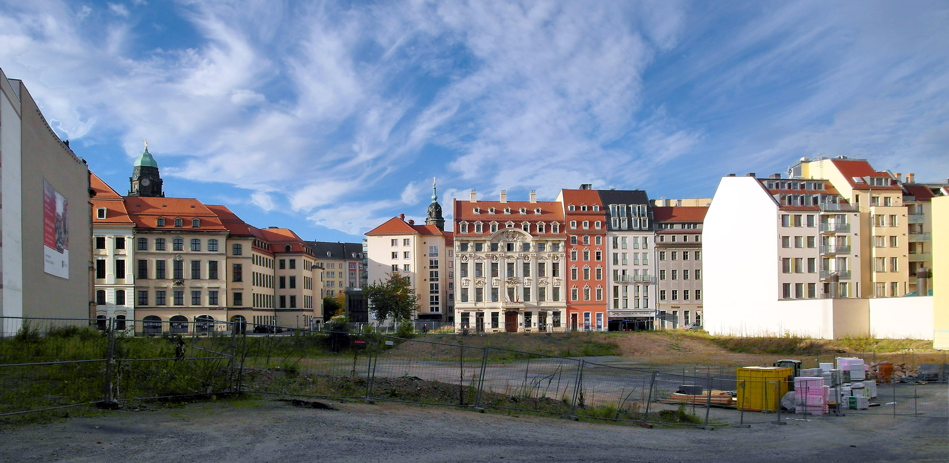 06.10.2012 01067 Dresden-Altstadt, Neumarktareal: Blick von der Rampischen Straße nach Süden, eine später verbaute Sicht. V.l.n.r.: Westflügel des Landhauses; Nachkriegswohnbauten Wilsdruffer Straße 2 und 4; Landhaus. straße 6, 4, 2. Die Landhausstraße 6 ist das historische Palais Beichlingen (erbaut 1712-1715), ab 1855 "British Hotel". 2008-2010 wieder aufgebaut. Rechts angeschnitten das Eckhaus Neumarkt 8 (Salomonisapotheke/Freiberger Schankhaus) und der Brandgiebel und Hofseiten von Landhausstr. 1 und Neumarkt 7. [SAM0989.JPG]20121006110DR.JPG(c)Blobelt